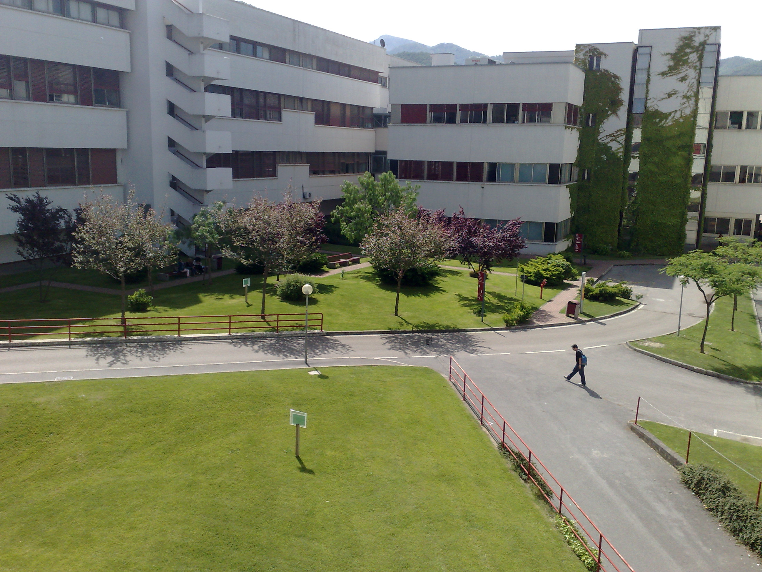 Università degli Studi di Salerno - Vista dalle aule di Ingegneria